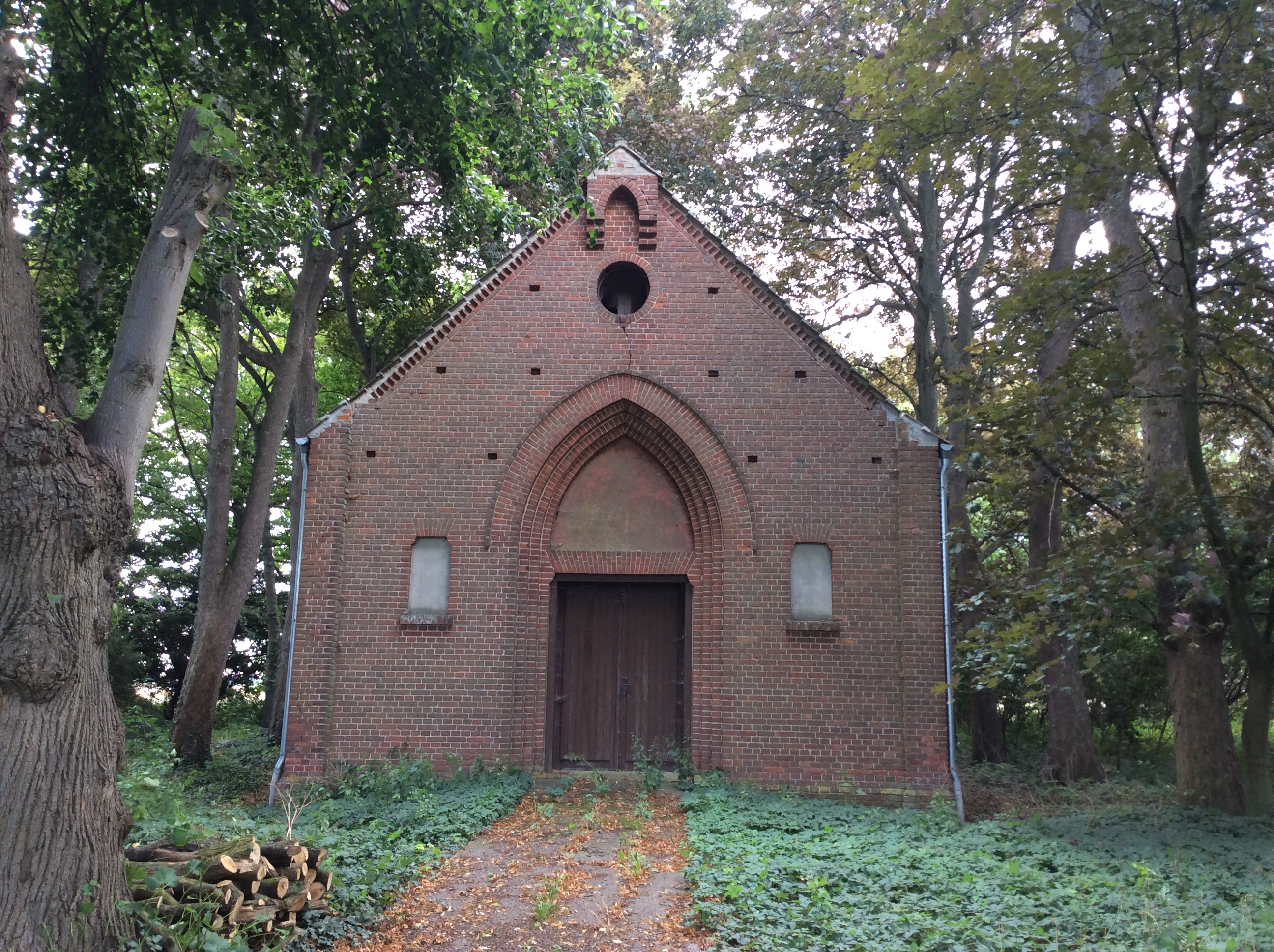 Die Kapelle in Alt Ungnade (Gemeinde Levenhagen, Landkreis Vorpommern-Greifswald) ist ein neugotische Backsteinbau des Schinkel-Schülers Menzel aus dem Jahr 1851. Über dem Westportal befindet sich eine spitzbogenförmige Blende mit Rundfenster und Giebelturm.